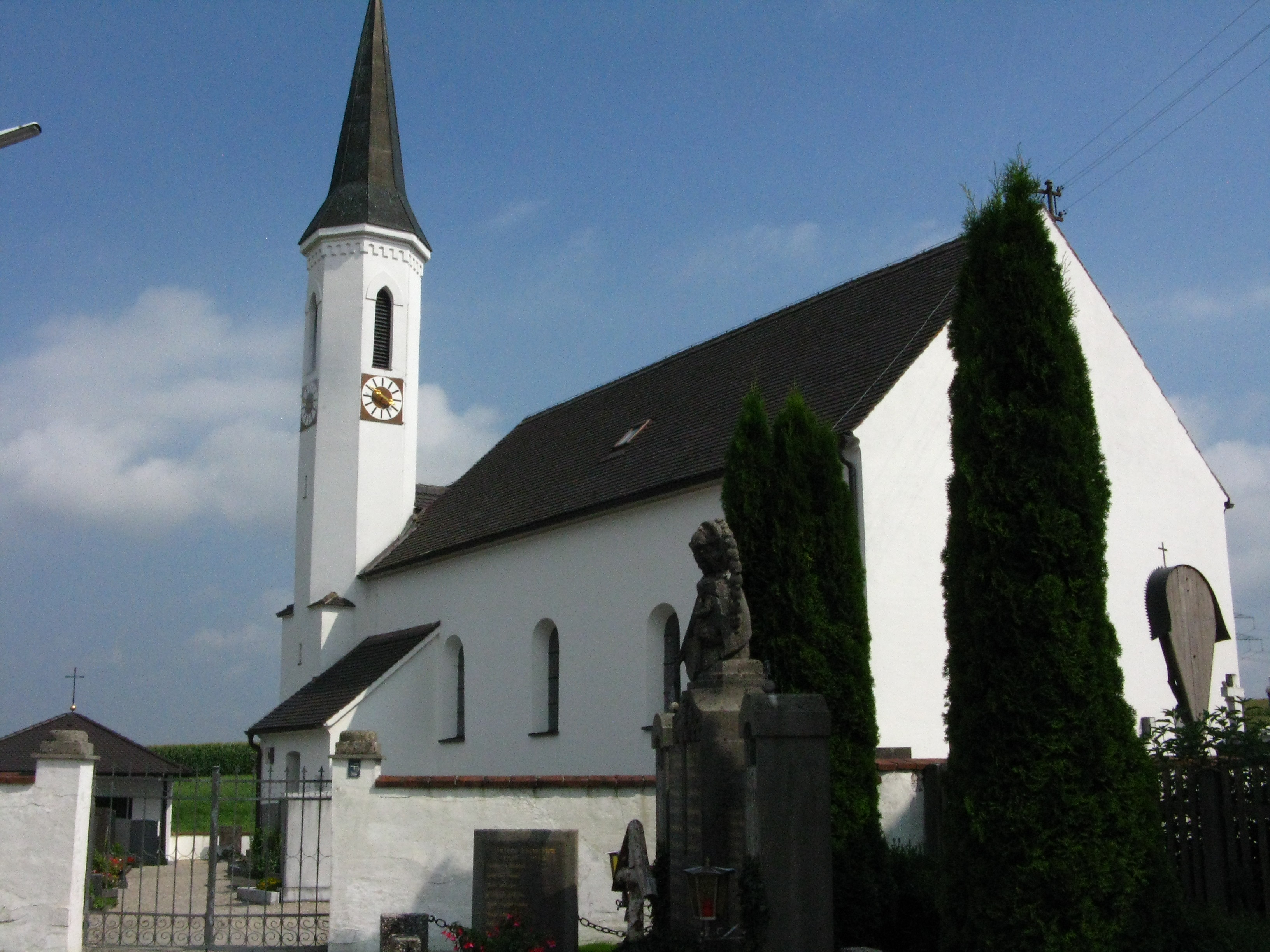 Oberzeitelbach Kirche Maria Himmelfahrt